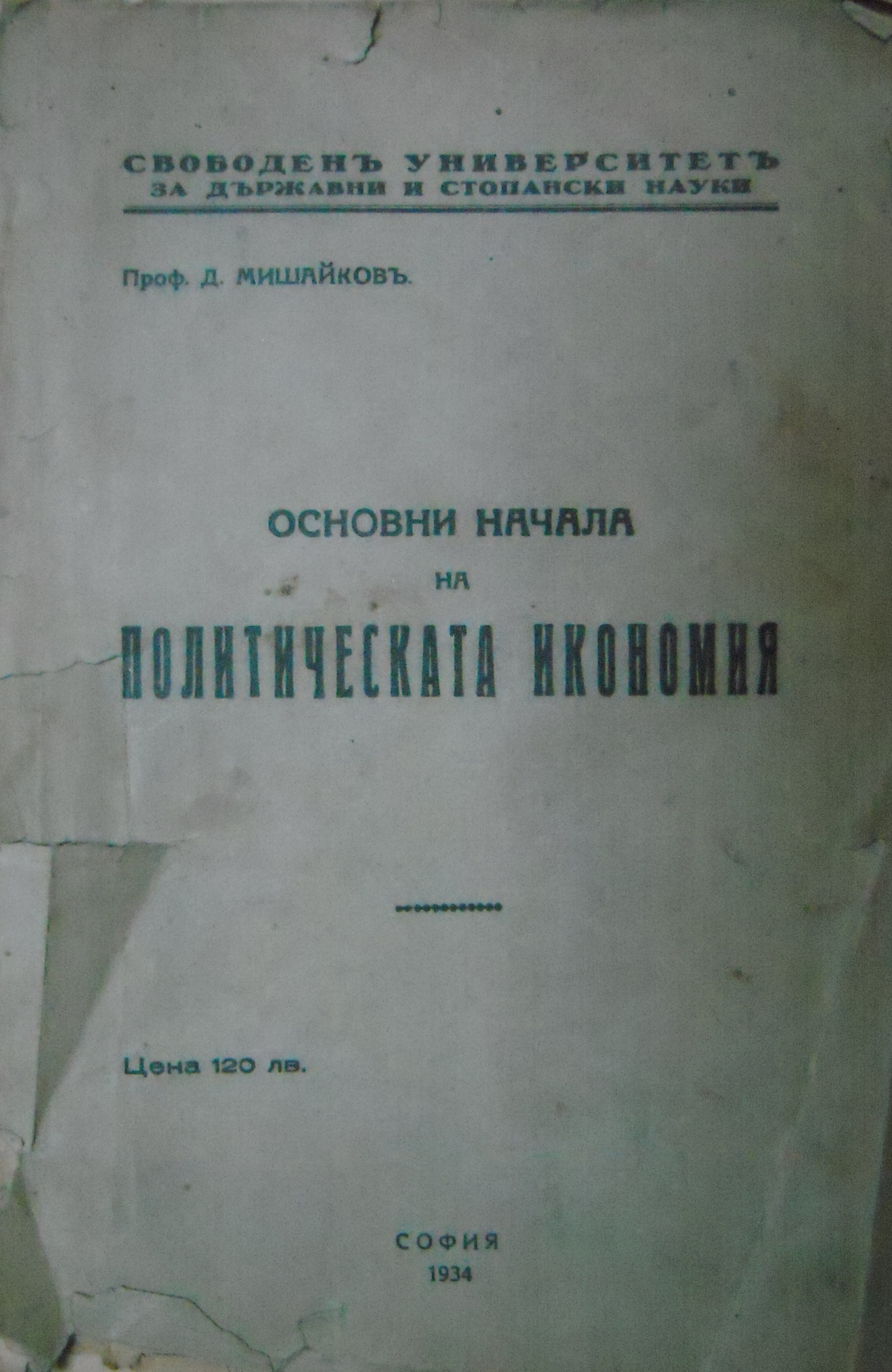 Корица на "Политическа икономия" на Димитър Мишайков.